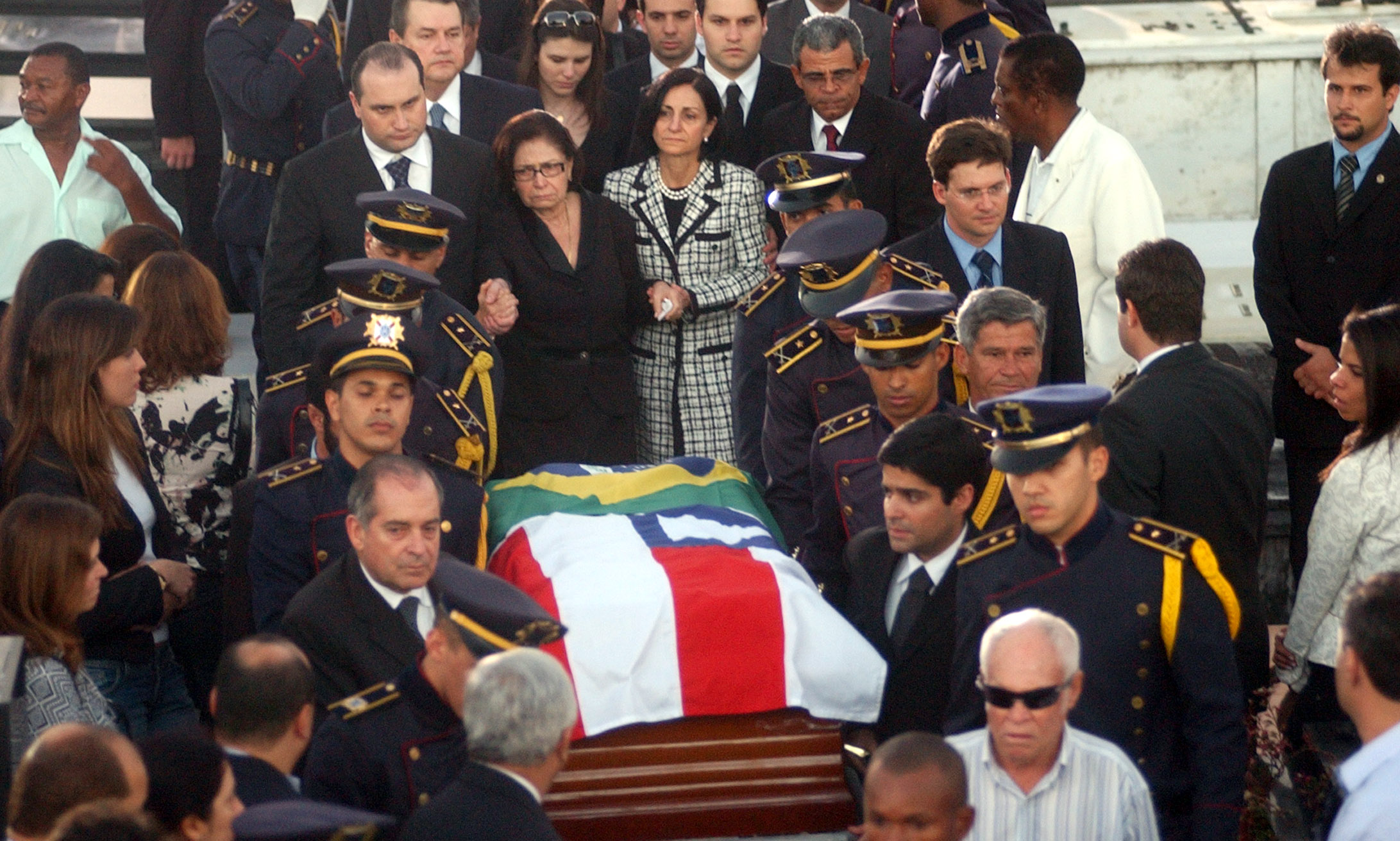 Salvador - Corpo de Antonio Carlos Magalhães é enterrado. Cerca de cinco mil pessoas participaram de velório